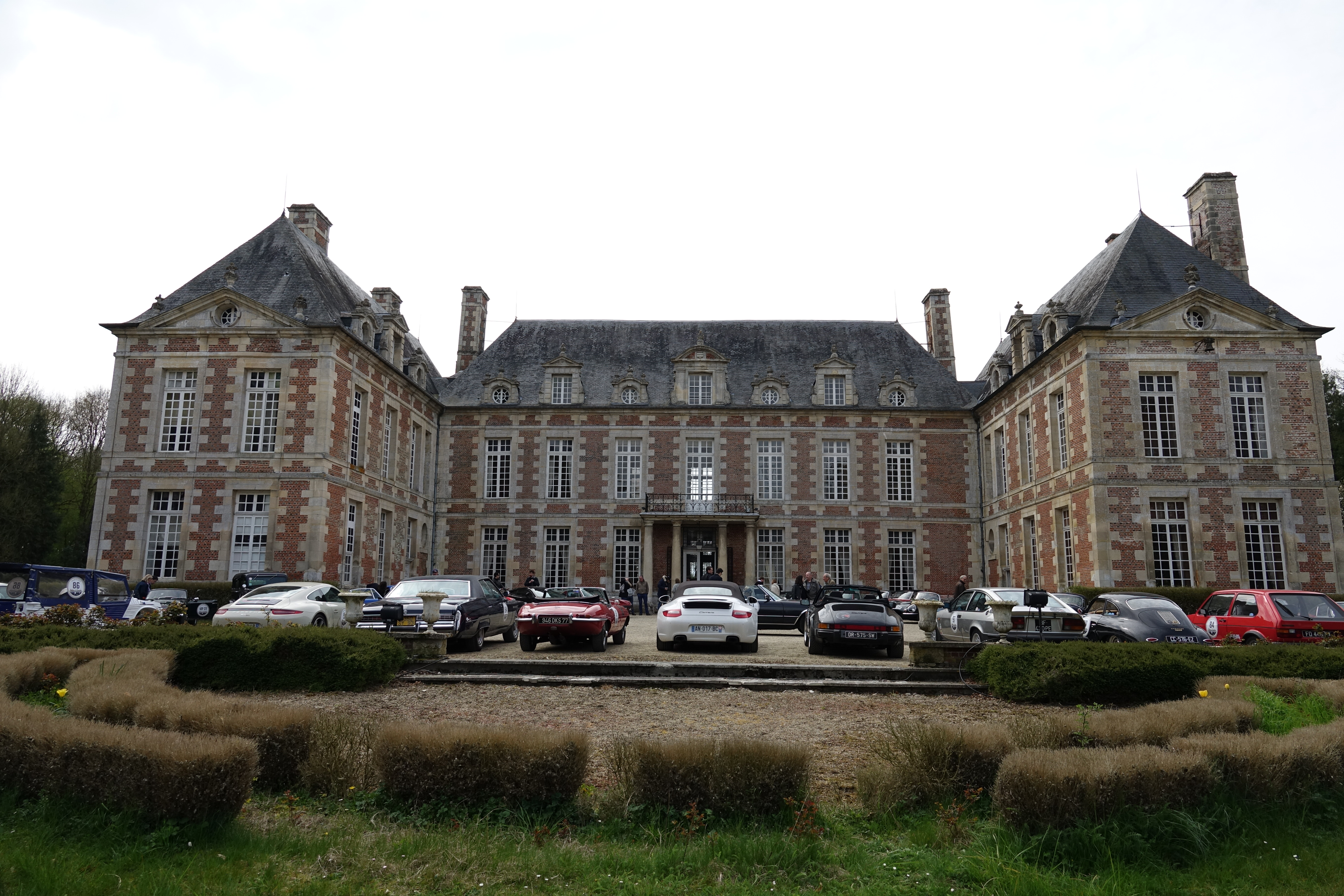 Rallye d'Aumale 2019 au Chateau du Fayel